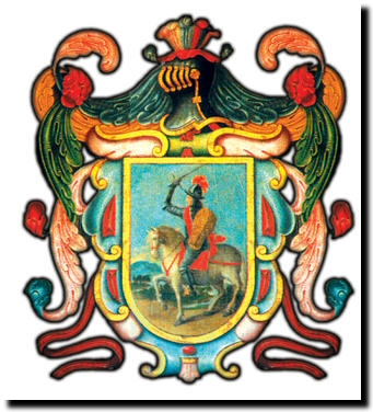 Escudo de Anover de Tajo. Toledo